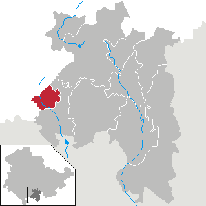 Bachfeld in Thüringen, Landkreis Sonneberg